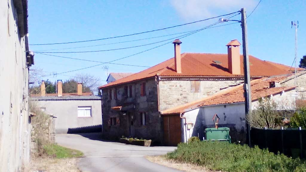 Vista de Muruxeses.